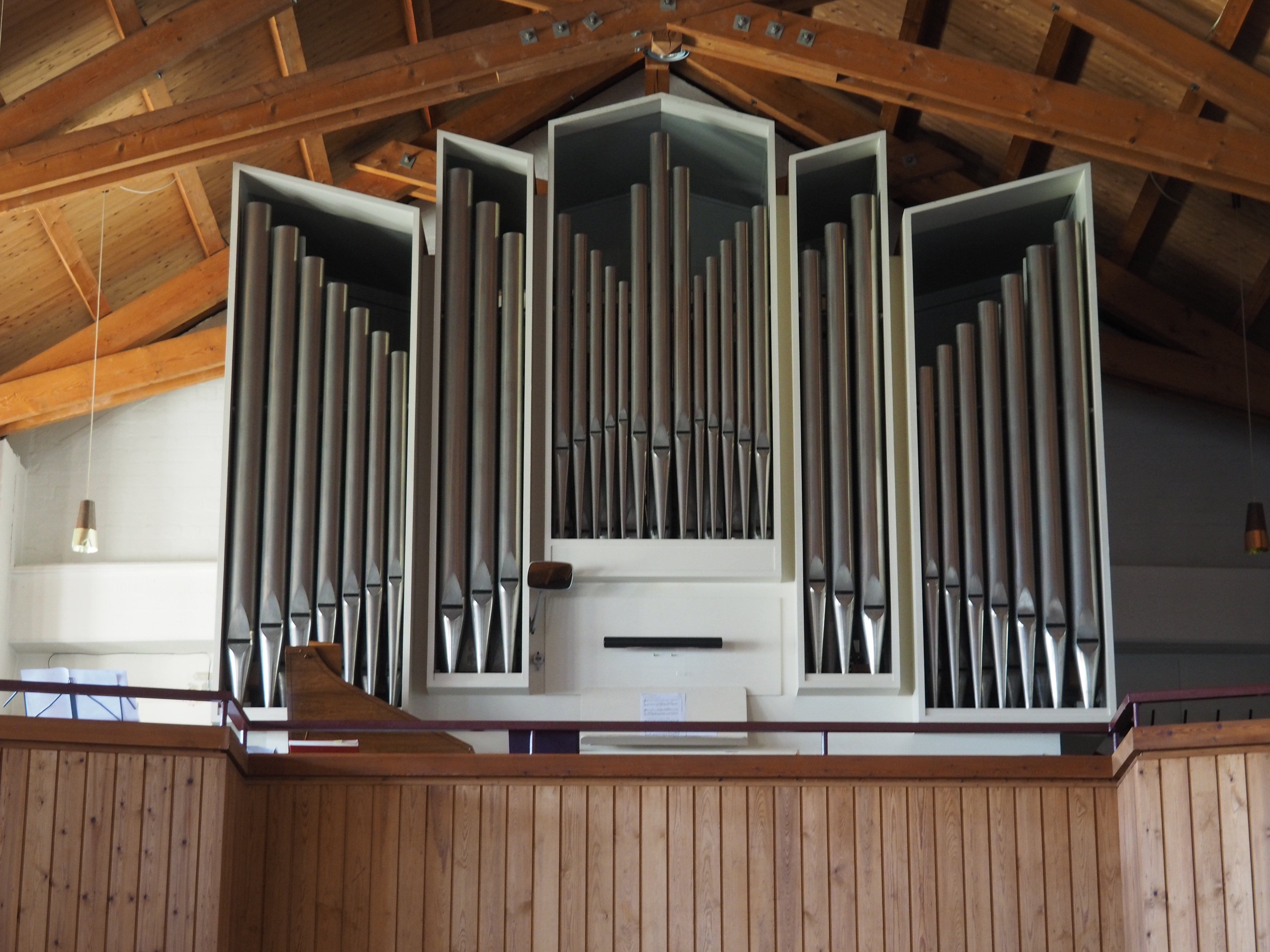 Hauptorgel der Kirche St. Nicolai auf Helgoland